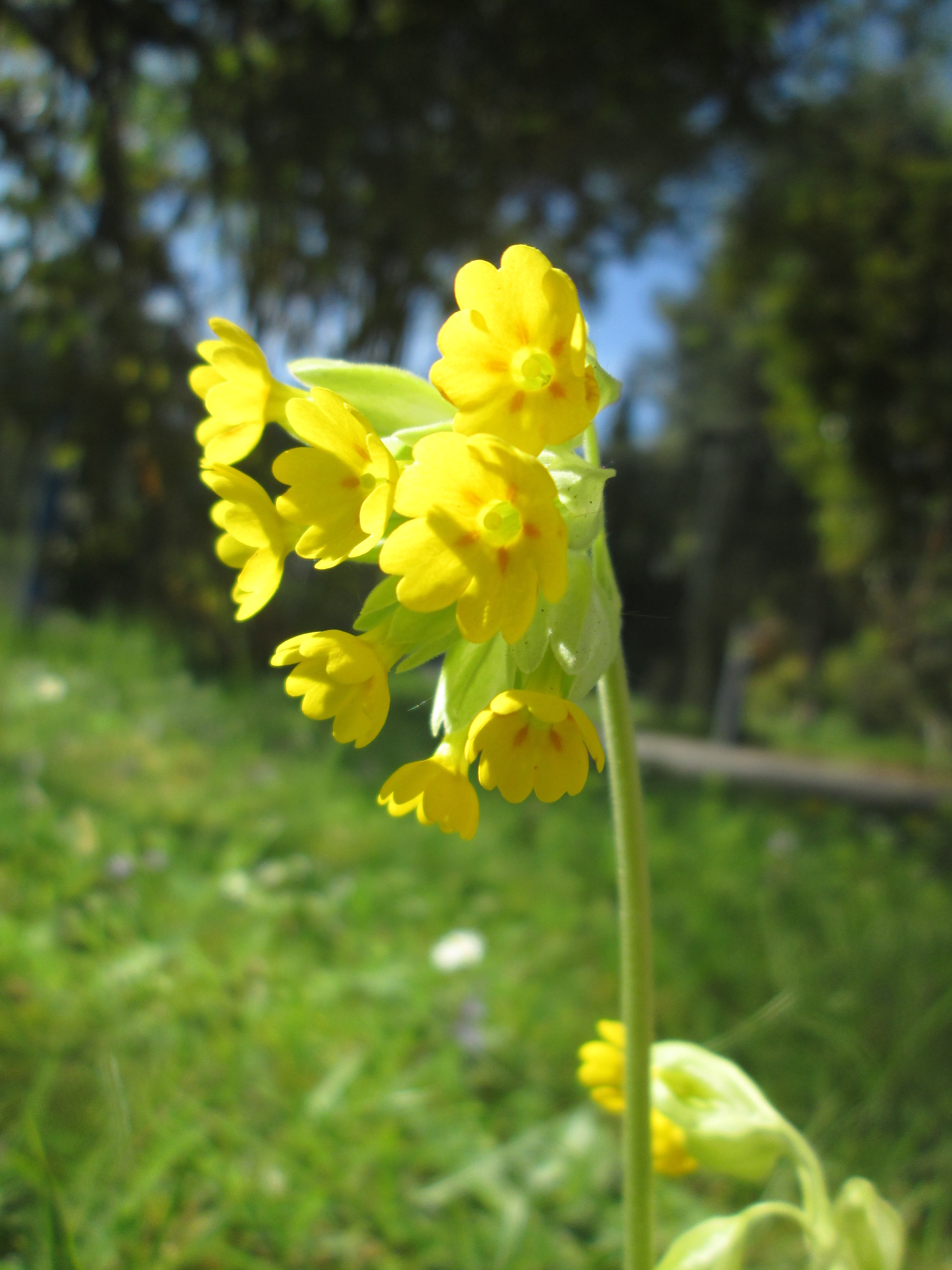 Echte Schlüsselblume (Primula veris) am Ev. Krankenhaus in Saarbrücken